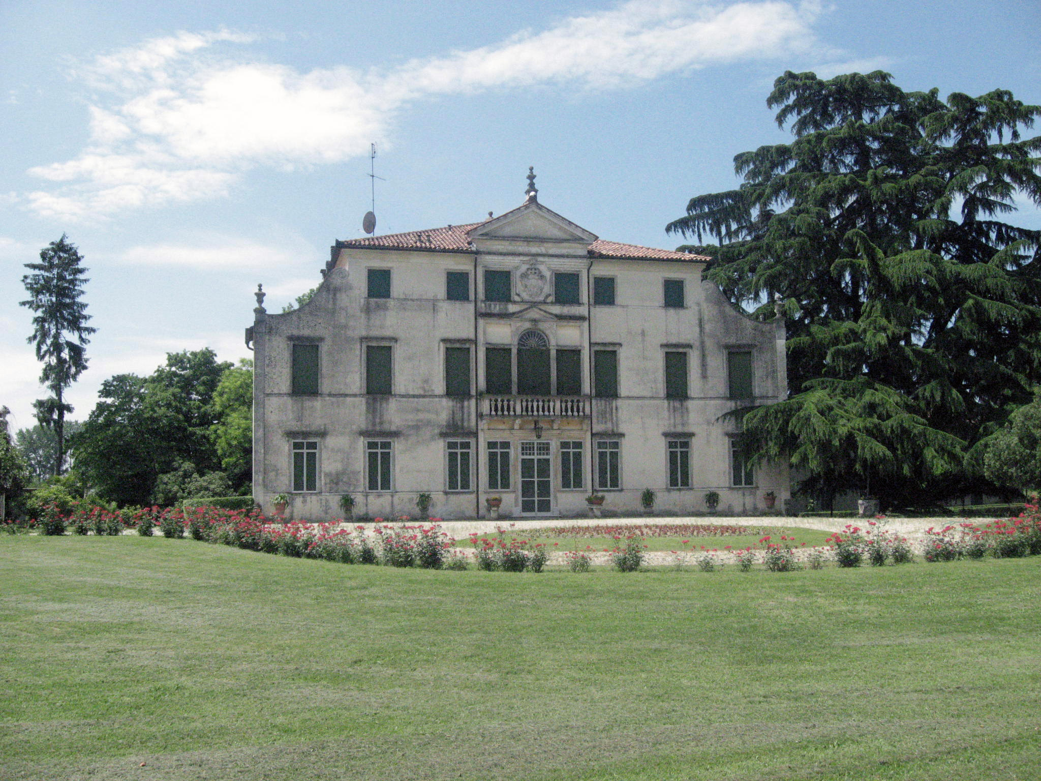 La facciata principale di Villa Manzoni a Noventa Padovana